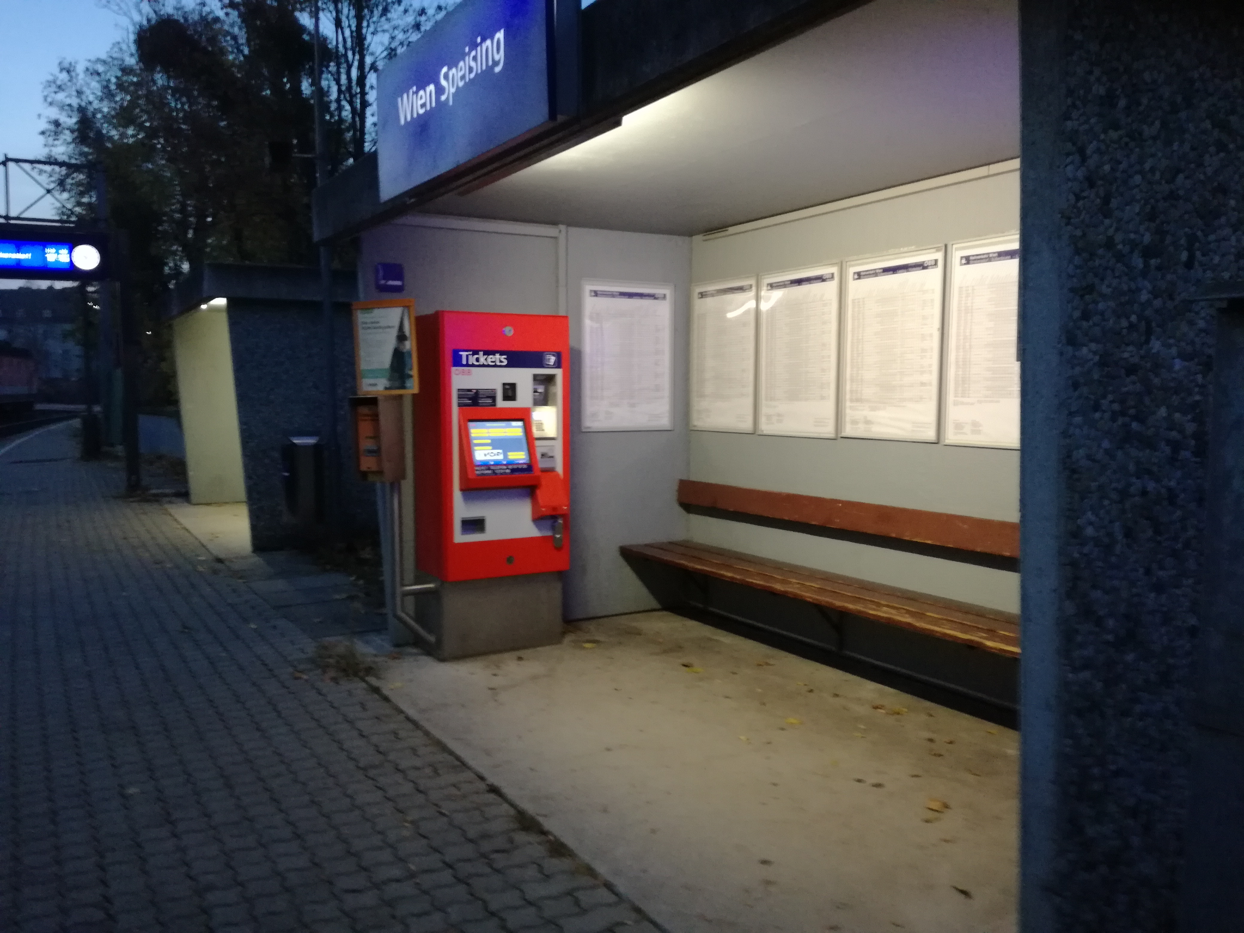 Das Wartehäuschen auf Bahnsteig 1, ausgerüstet mit Ticketautomat, Fahrplänen, einer Bank sowie einer elektronischen Abfahrstafel